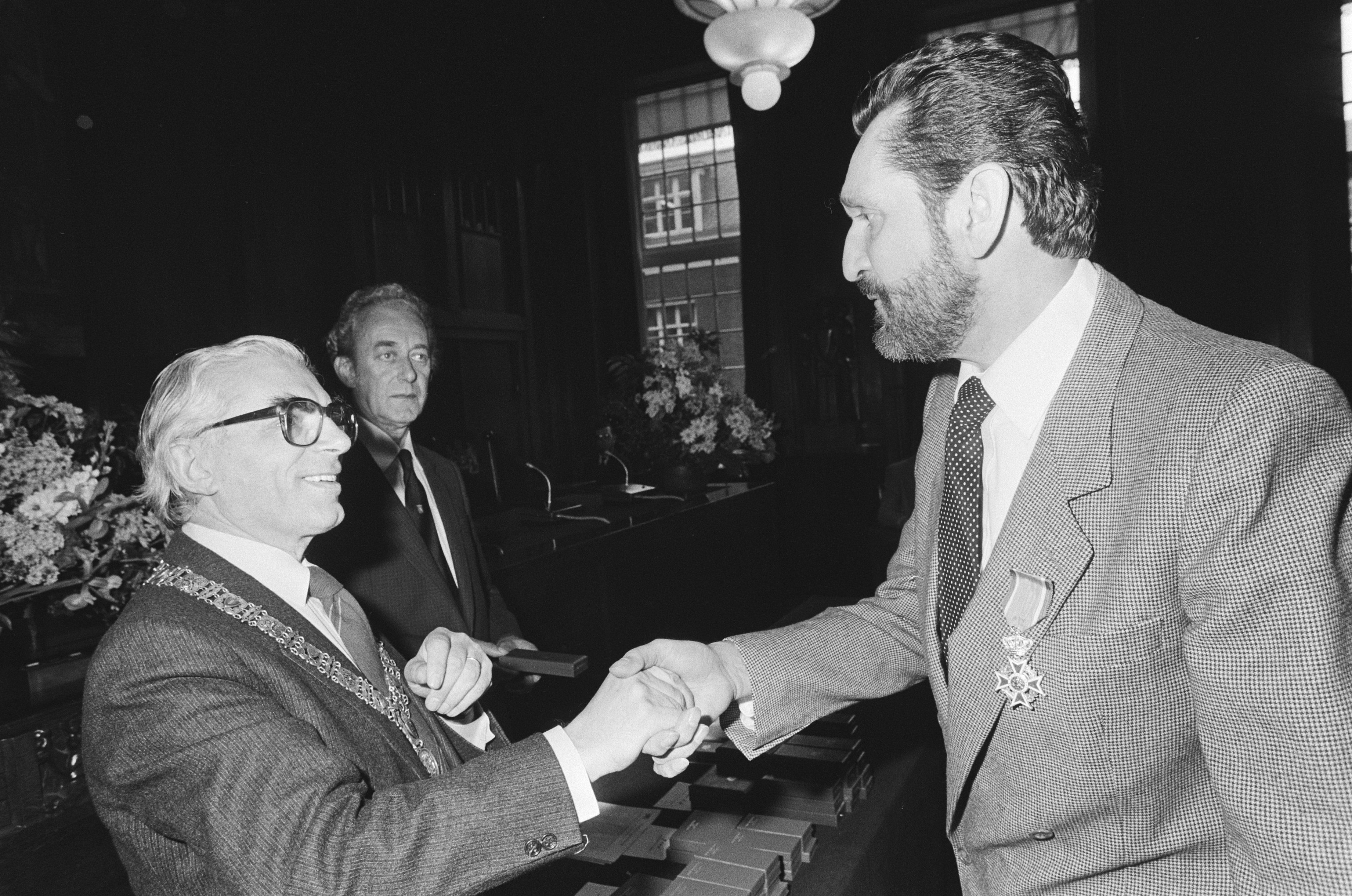 Collectie / Archief : Fotocollectie Anefo Reportage / Serie : [ onbekend ] Beschrijving : Jaarlijkse "lintjes" op het stadhuis uitgereikt. J. J. de Crane (impresario, producent) ontvang onderscheiding van Polak Datum : 29 april 1982 Trefwoorden : lintjesregen Persoonsnaam : J. J. De Crane Fotograaf : Dijk, Hans van / Anefo Auteursrechthebbende : Nationaal Archief Materiaalsoort : Negatief (zwart/wit) Nummer archiefinventaris : bekijk toegang 2.24.01.05 Bestanddeelnummer : 932-1296